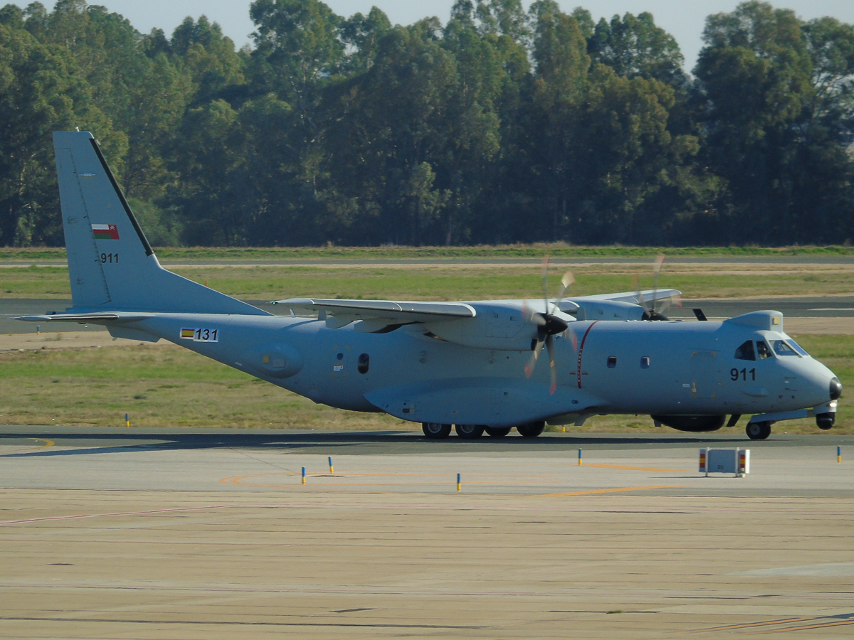 C295 MPA OMAN